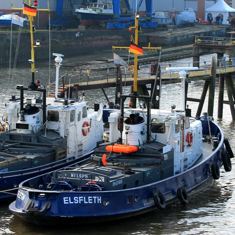 Eisbrecher Wilgum